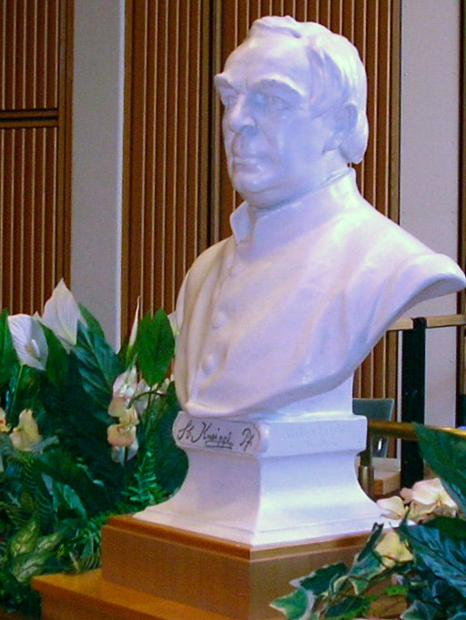 Büste von Sebastian Kneipp, 2011 im Kurhaus Bad Wörishofen.